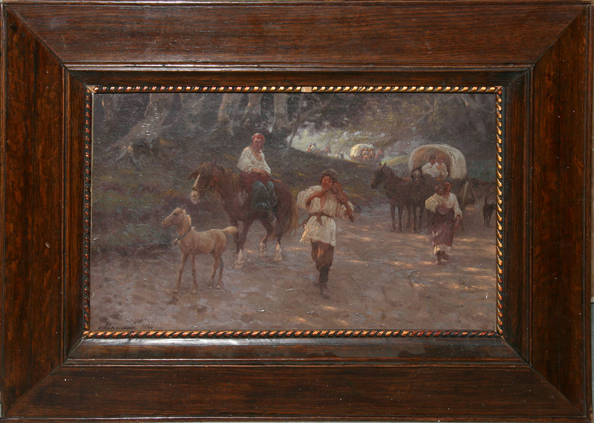 Цыганский табор (1890-е гг)